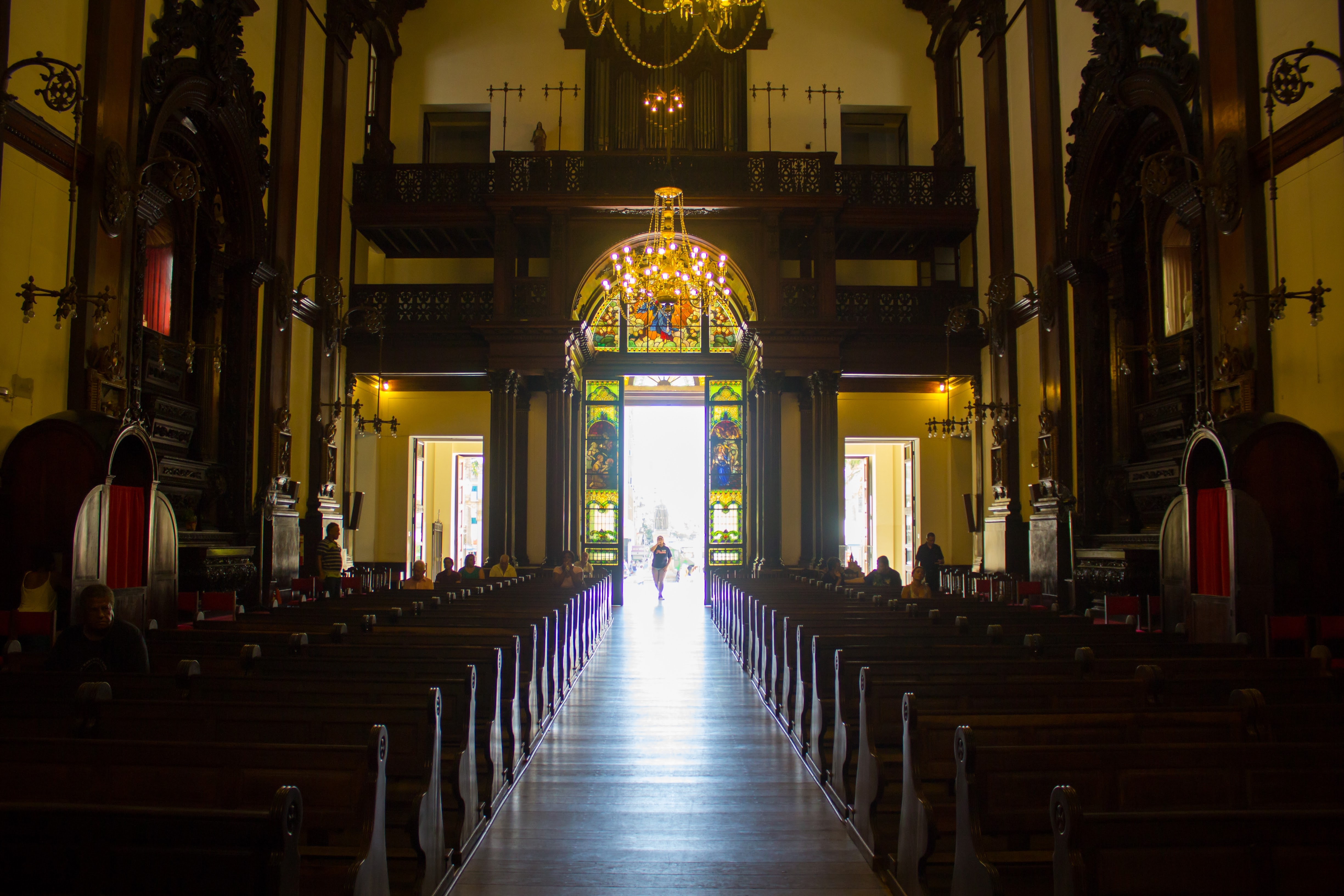 A Catedral Metropolitana de Campinas é tão bela por dentro quanto por fora. Com detalhes e adornos todos em madeira ela cria um ambiente imersivo na arte barroca baiana.